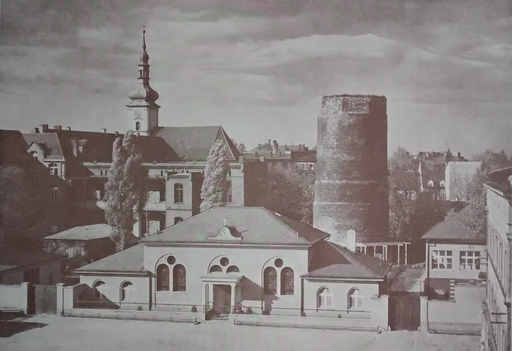 Klasztor Bonifratrów i Wieża Woka w Prudniku.